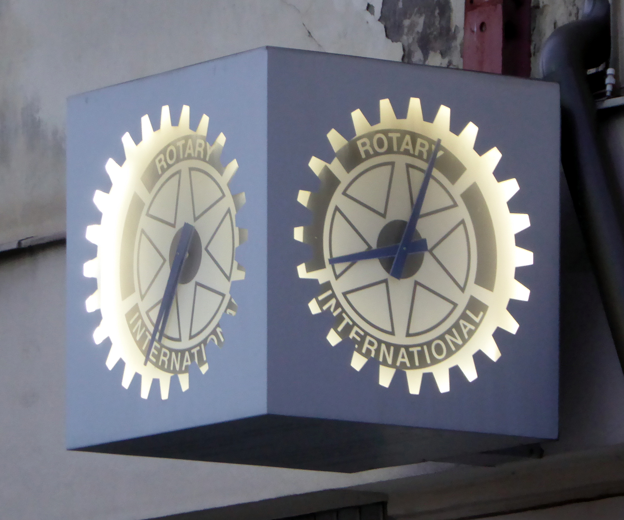 Laibach (Slowenien), öffentliche Uhr des Rotary-Klubs.